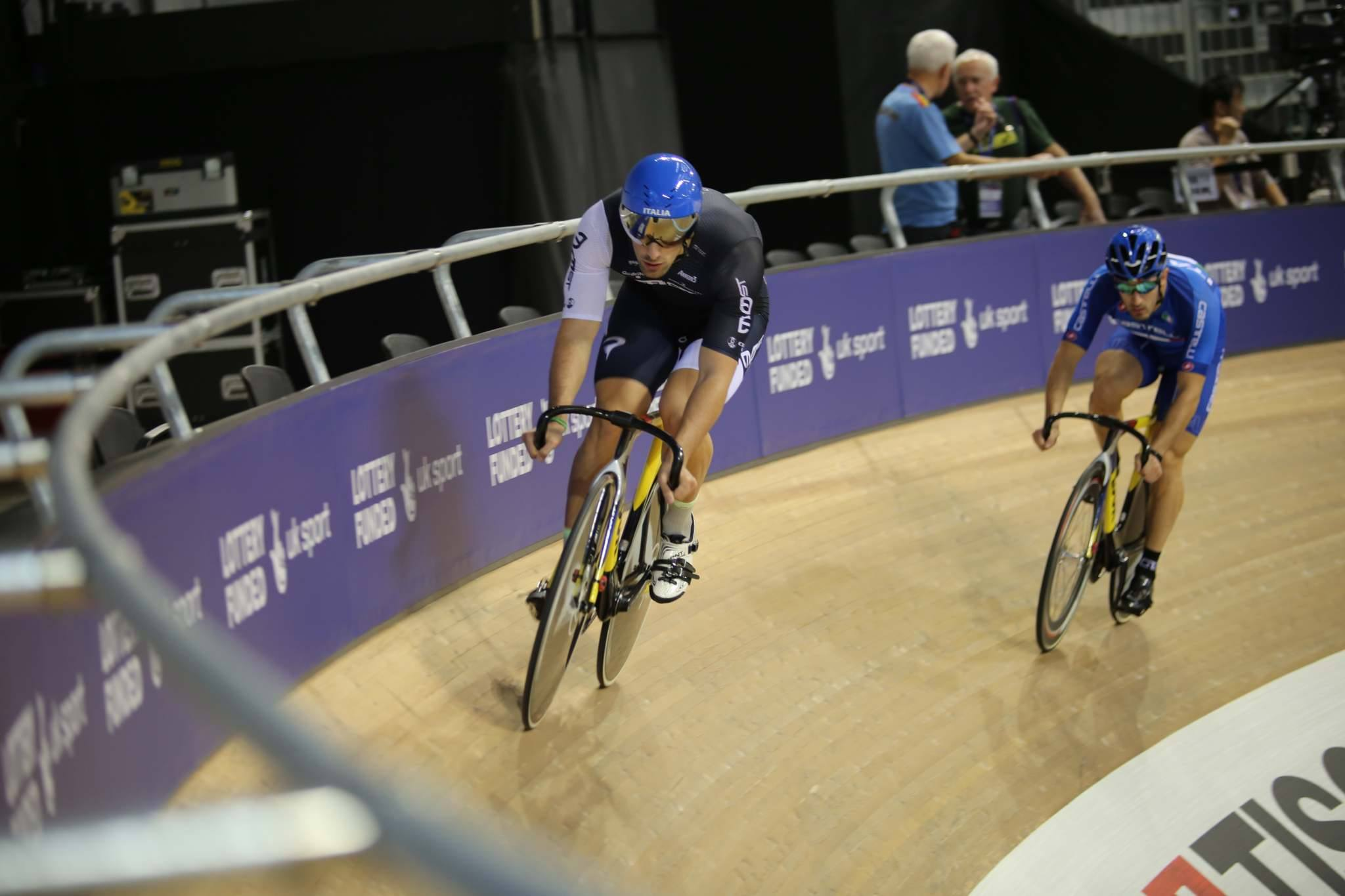 Davide Ceci, Italian cyclist (front)